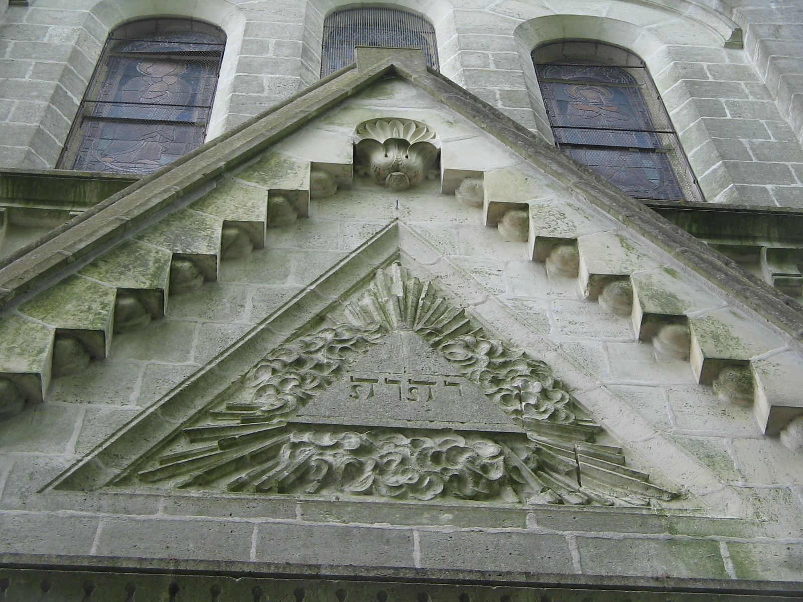 au dessus du portail de l'église de Taugon (17) en mai 2013